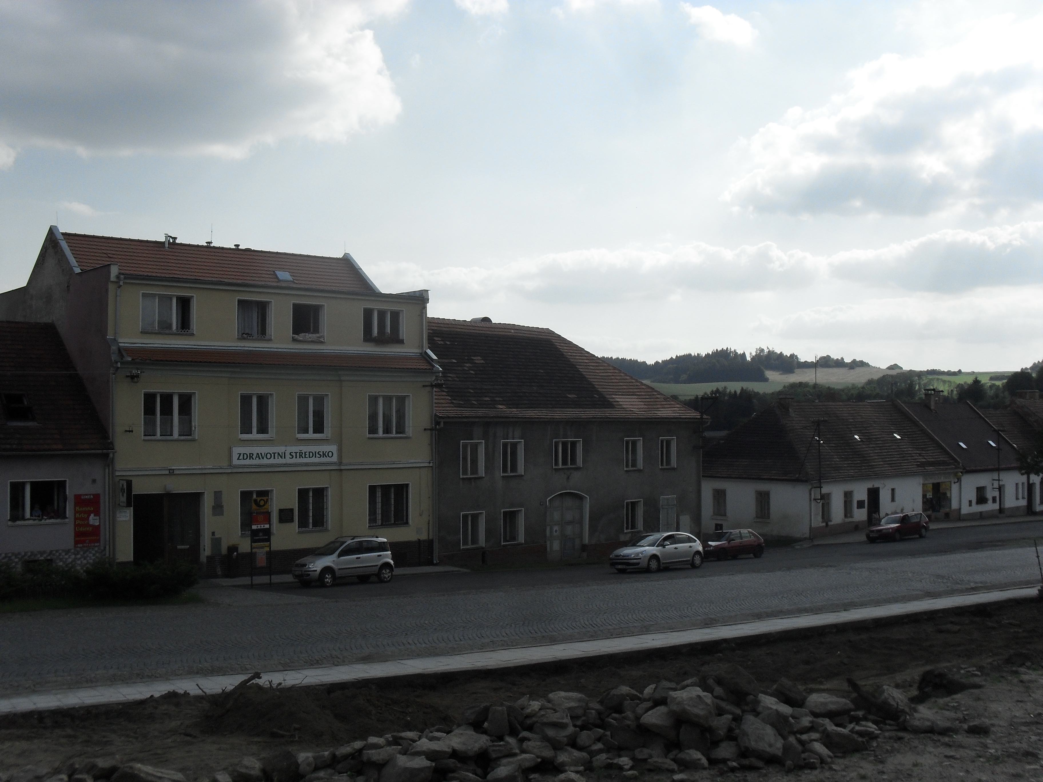 Plánice, rodiště Františka Křižíka ( nachází v okrese se Klatovy v Plzeňském kraji ).